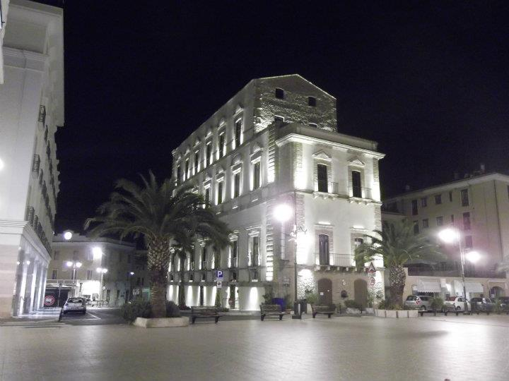 Palazzo Farnese (esterni) This is a photo of a monument which is part of cultural heritage of Italy.